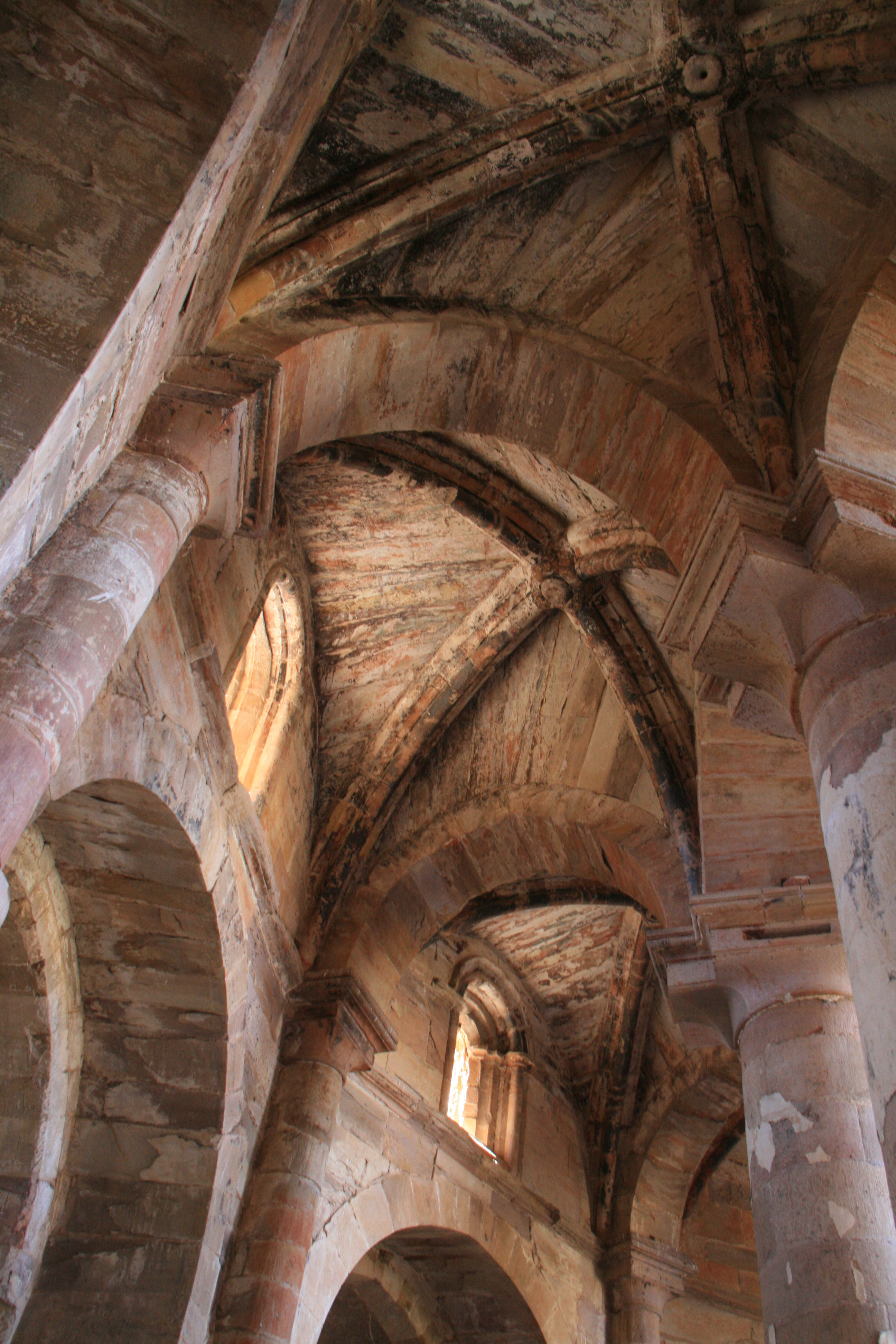 Bóvedas de Santa María de Moreruela - Zamora